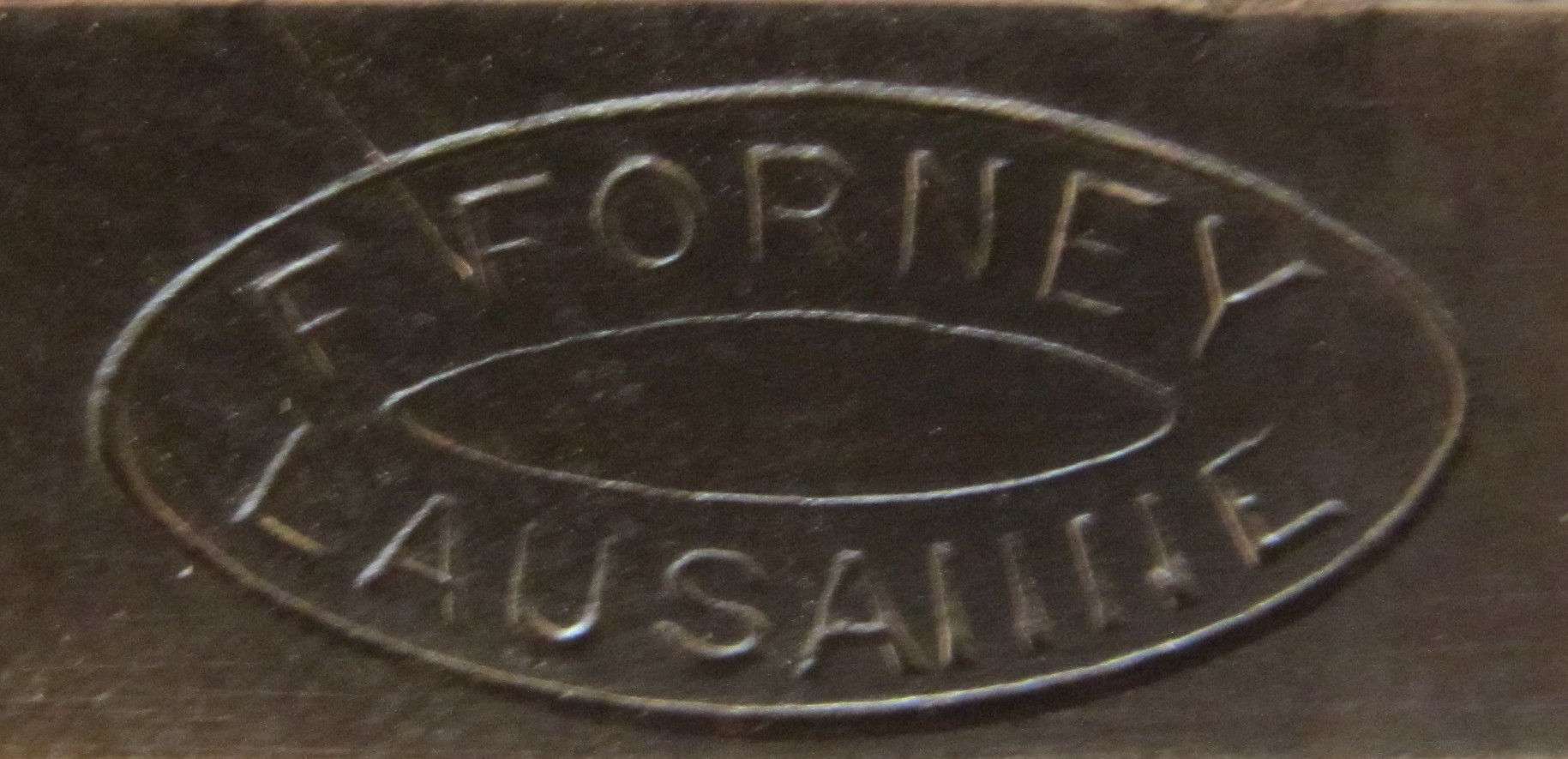 Poinçon de l'armurier François Forney à Lausanne 1892-1925